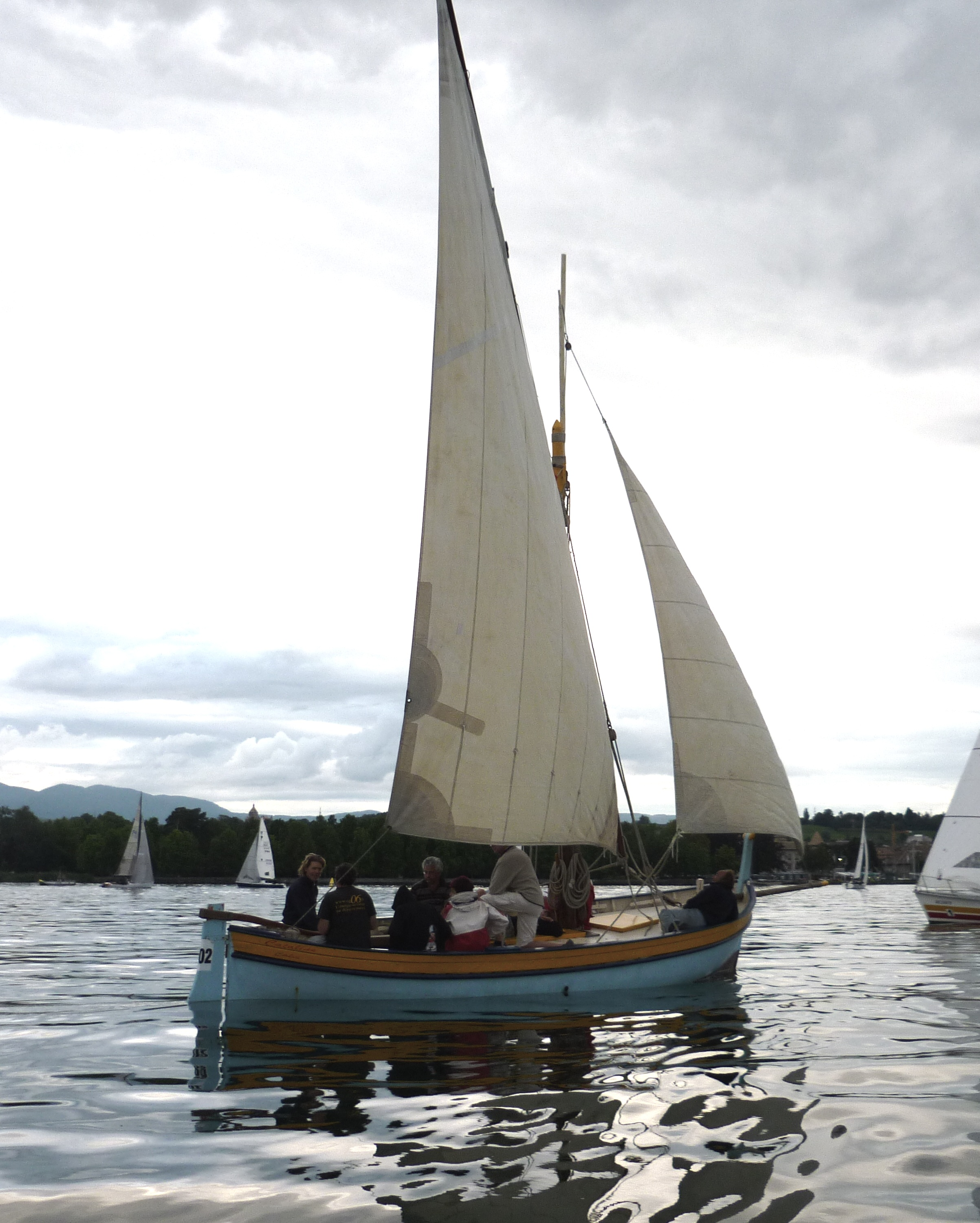 La barque corse Catalina, basée à Cagnes-sur-Mer, sur le Léman, été 2011